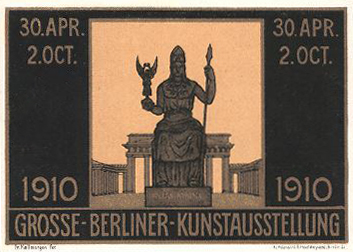 Ausschnitt einer Werbepostkarte für die Große Berliner Kunstausstellung 1910 von Friedrich Kallmorgen